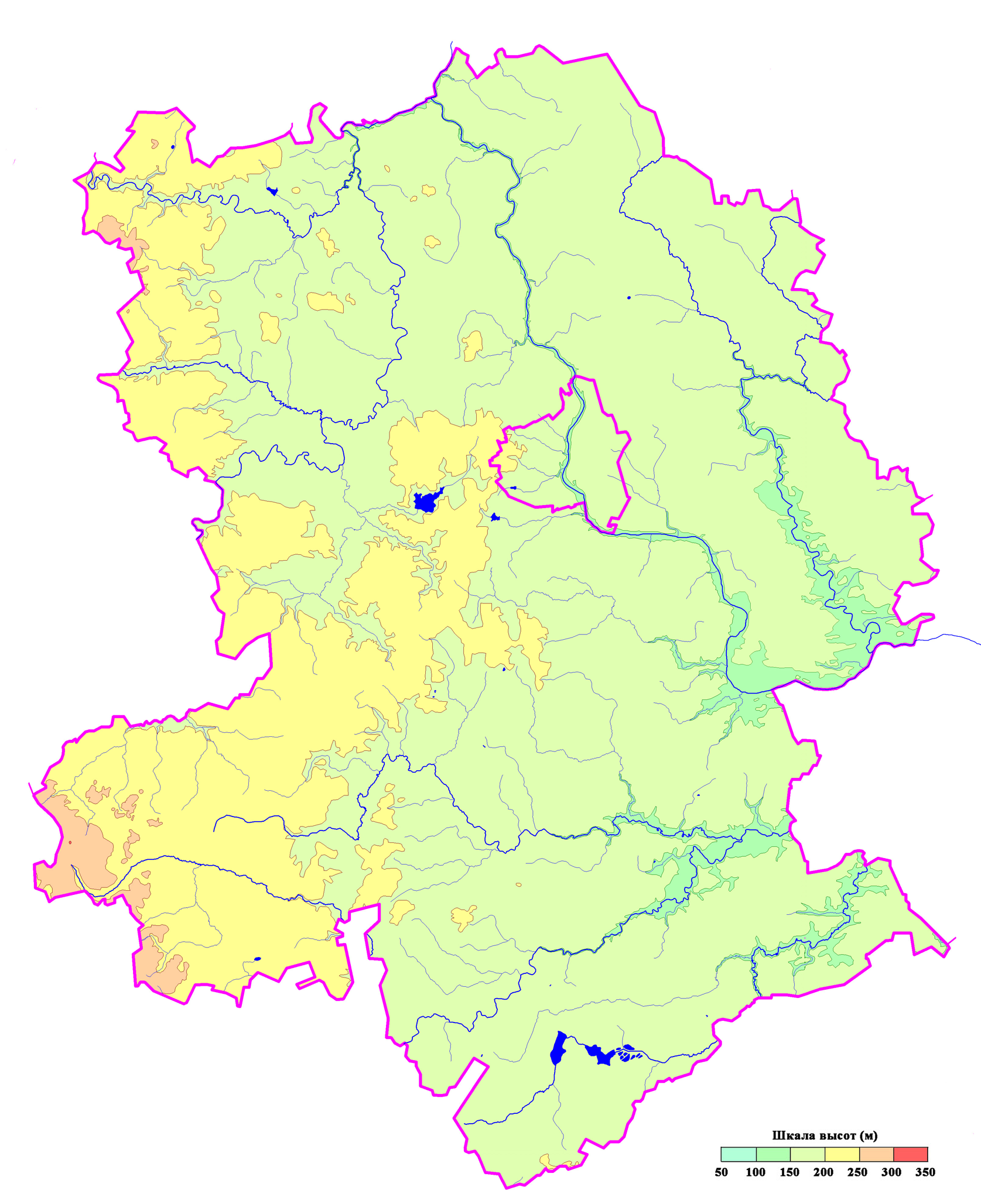 Физическая карта Торжокского района Тверской области